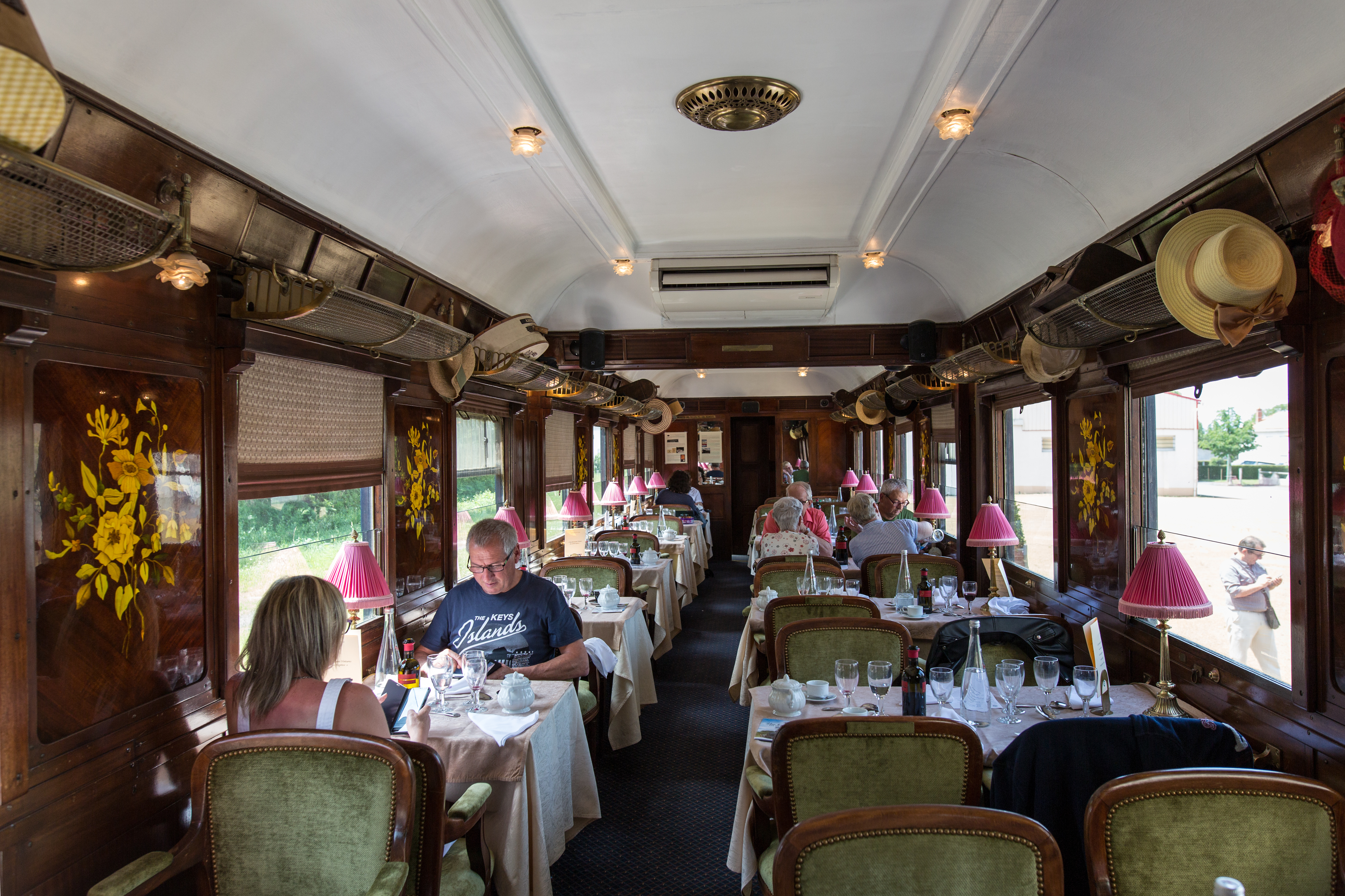 Intérieur de la voiture-restaurant CIWL 2750